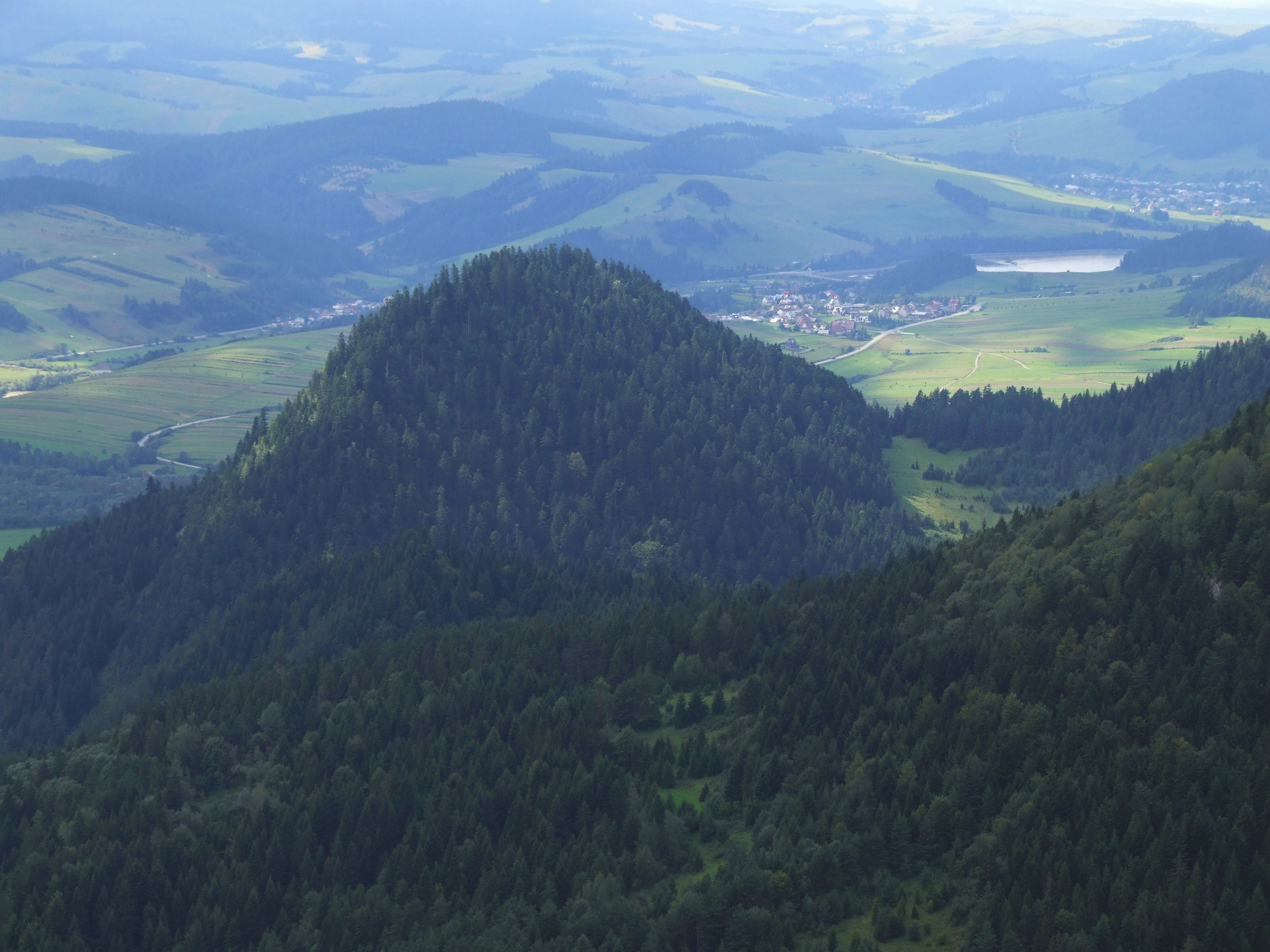 Widok z Trzech Koron